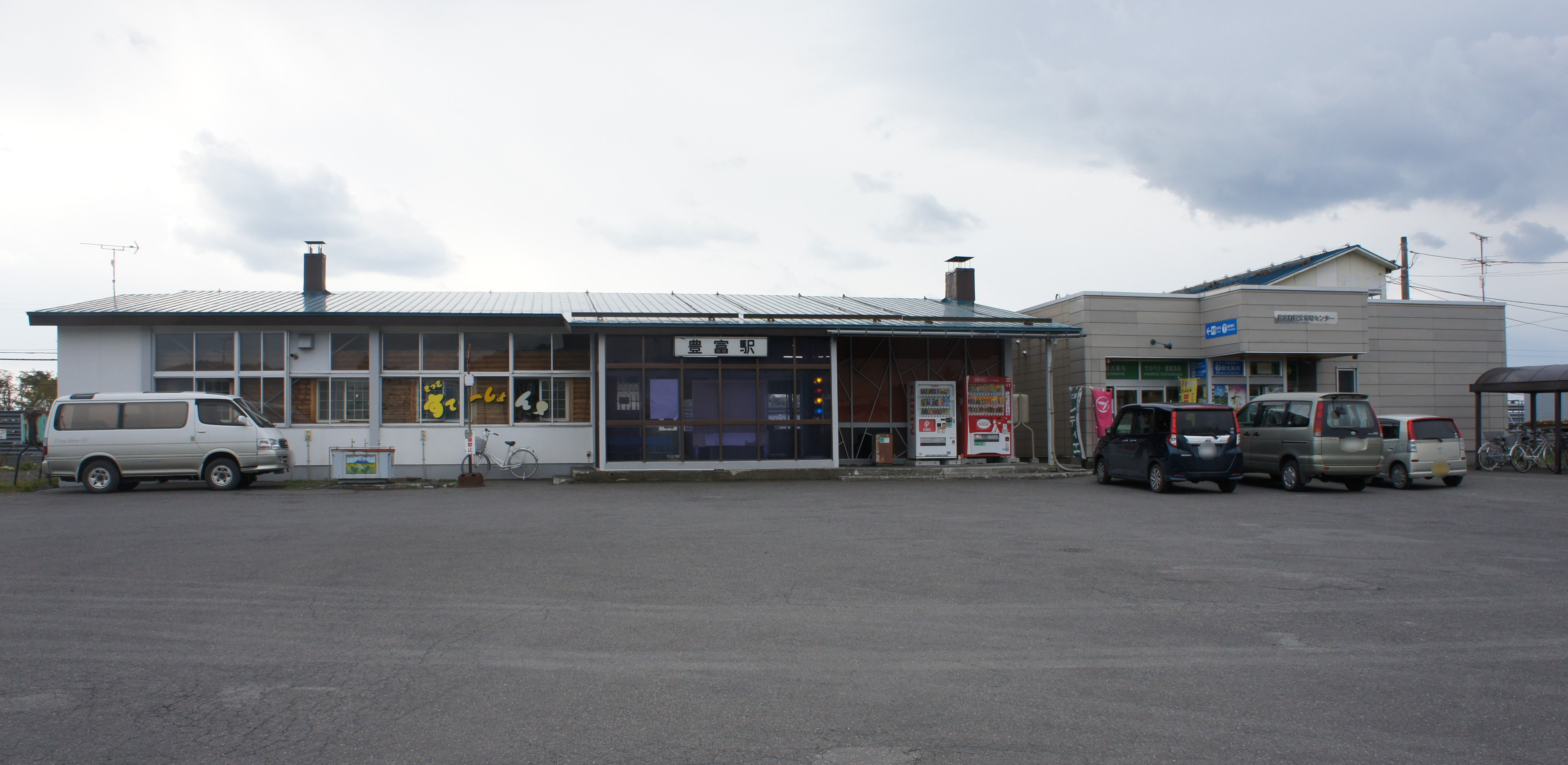 JR宗谷本線・豊富駅の駅舎